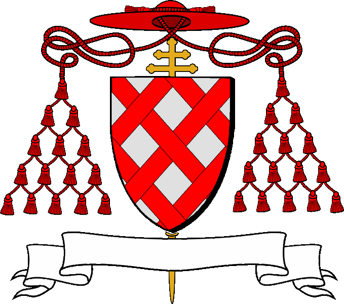 Plezhek etre argant ha gwad